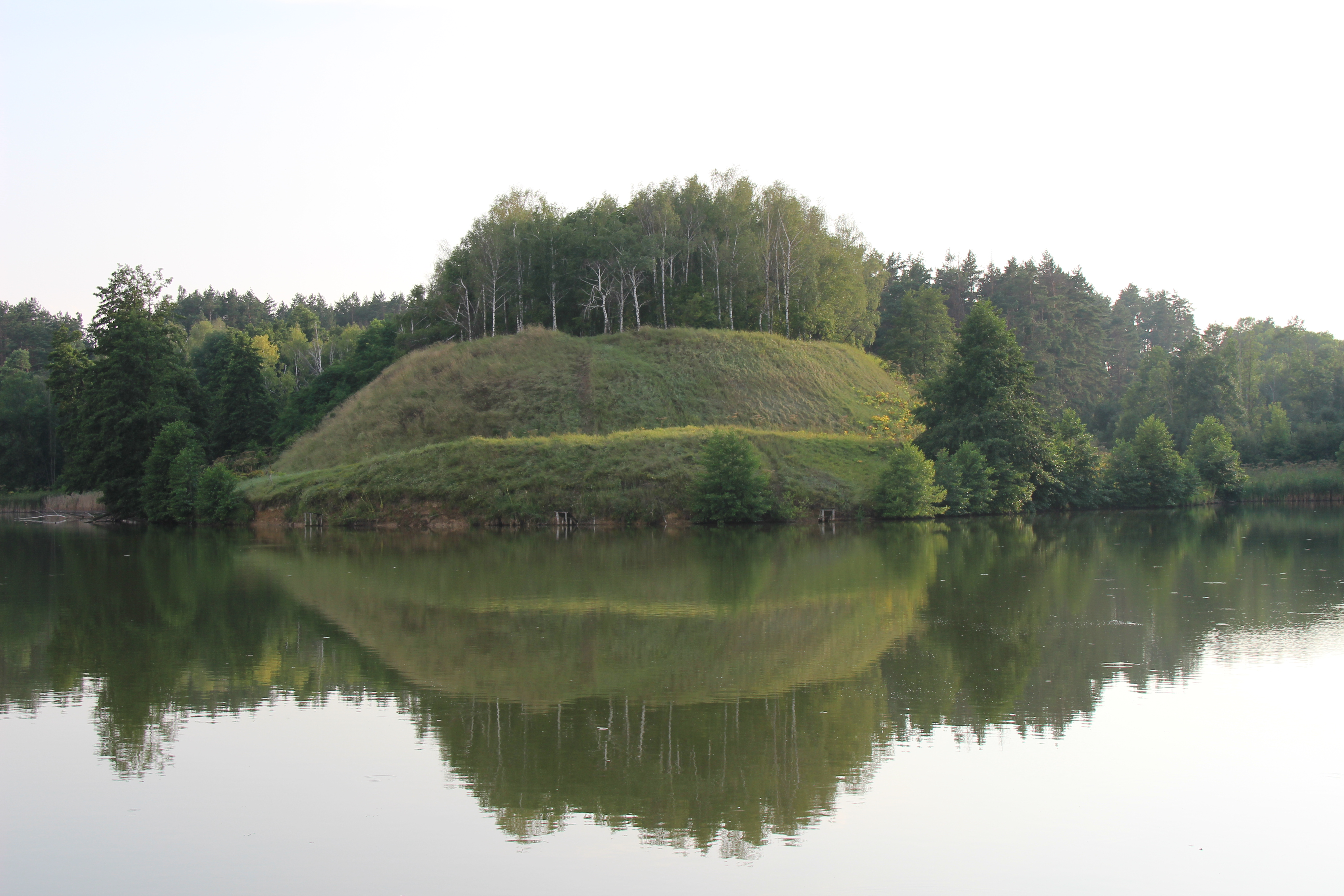 Городище літописного міста Ярополча, Яроповичі, на південь від села урочище Замок